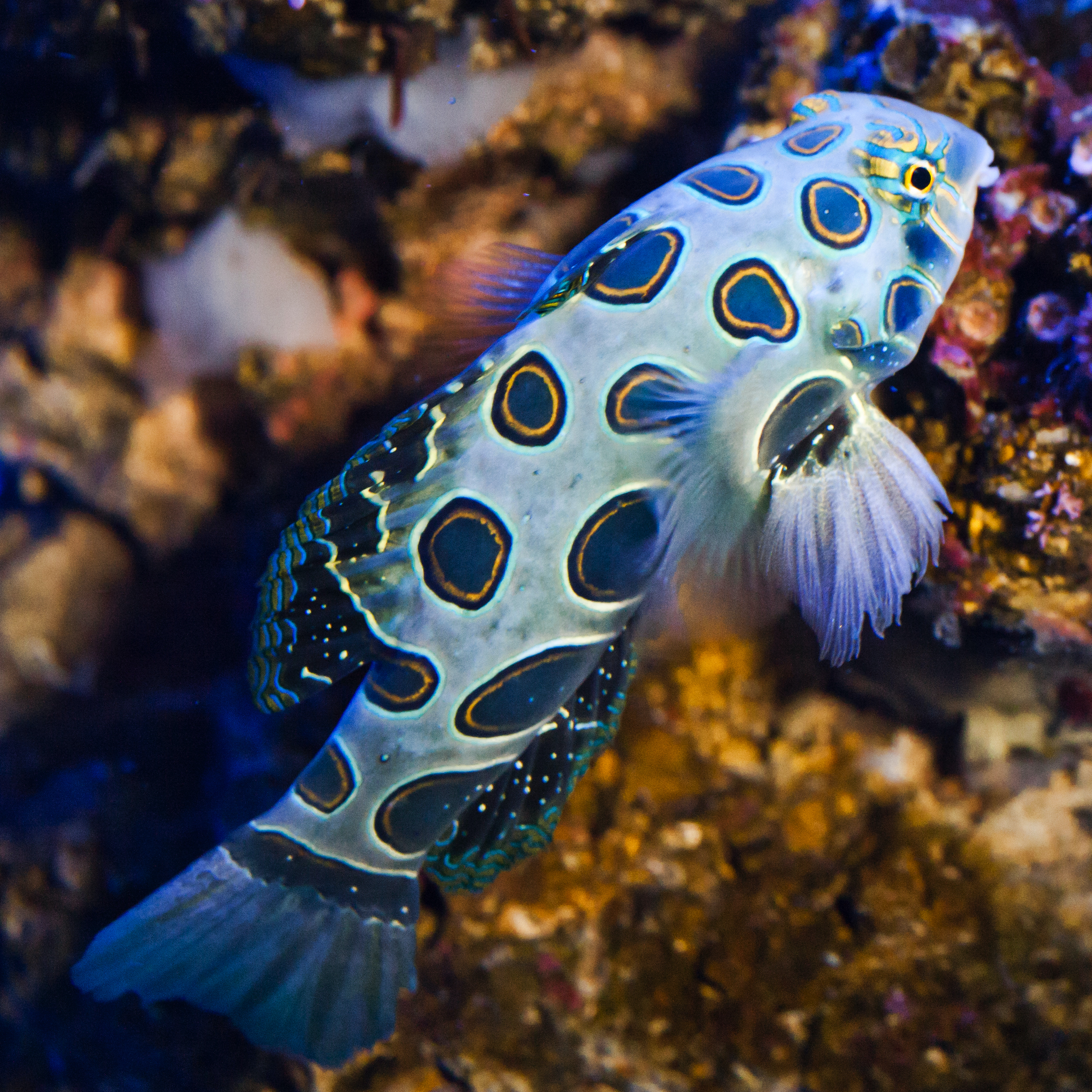 Pez mandarín - Palma Aquarium